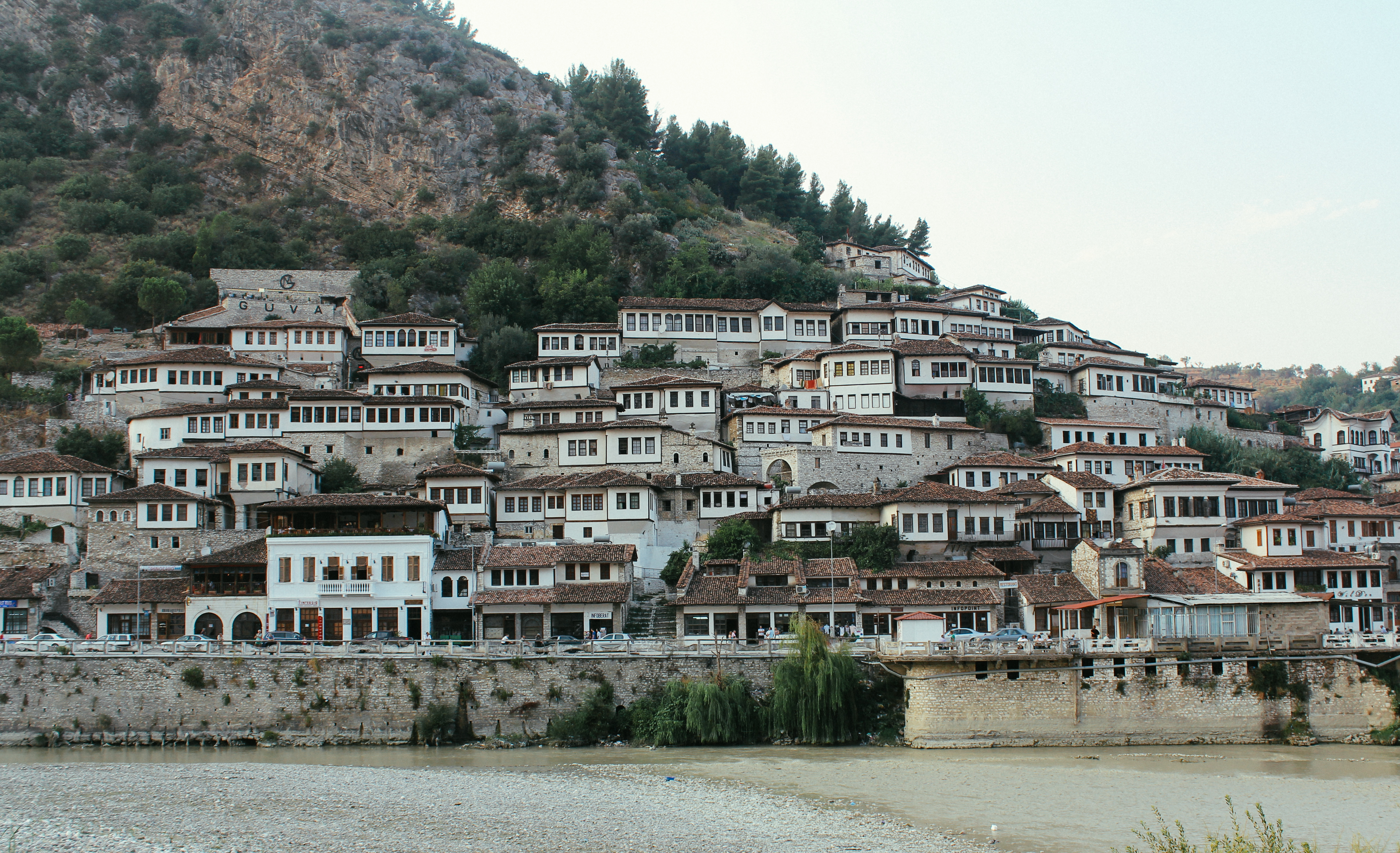 Вид на исторический центр Берата